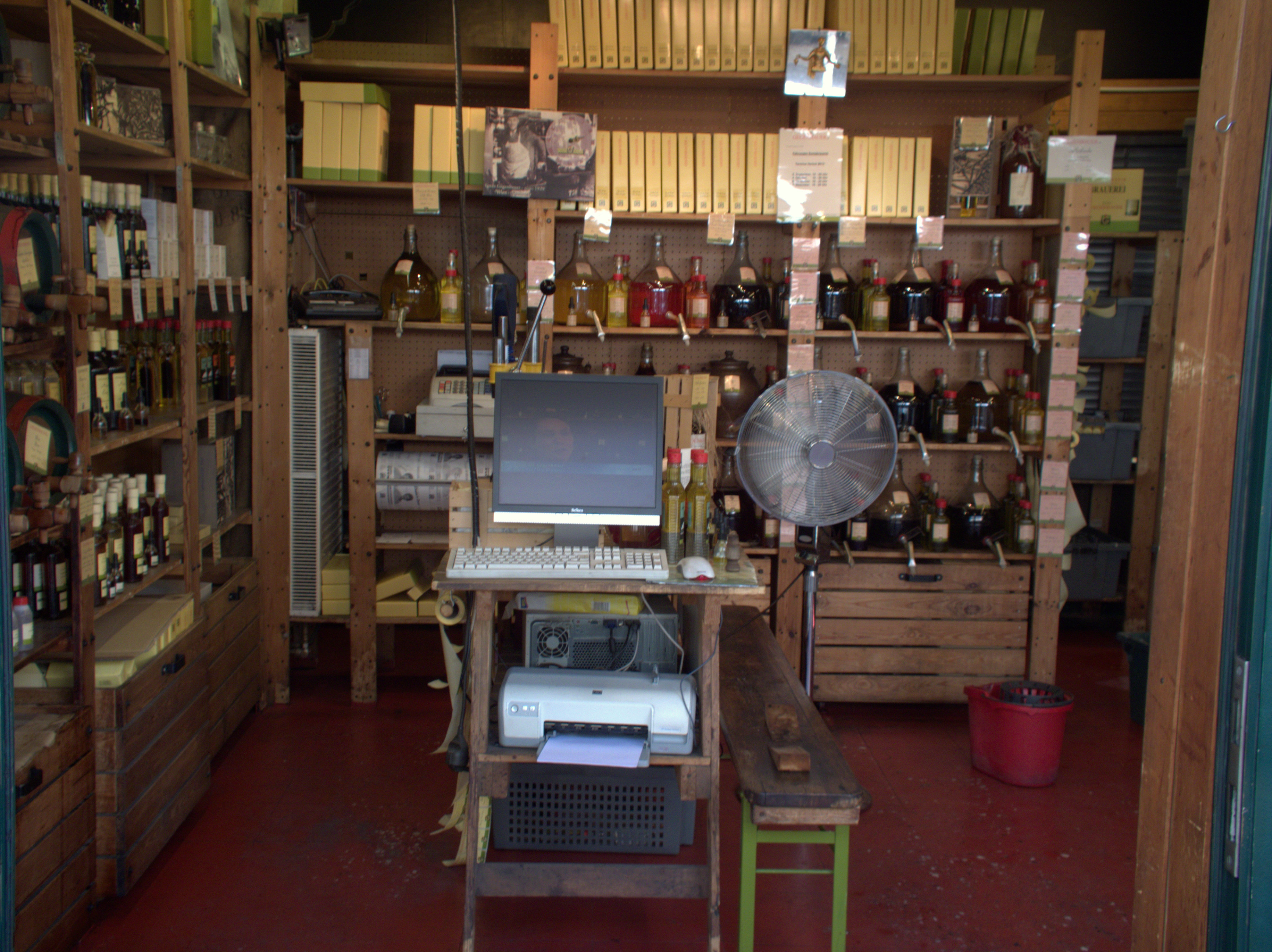 Der Naschmarkt zu Wien